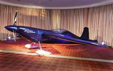 Besenyei Péter Corvus Racer 540 gépe